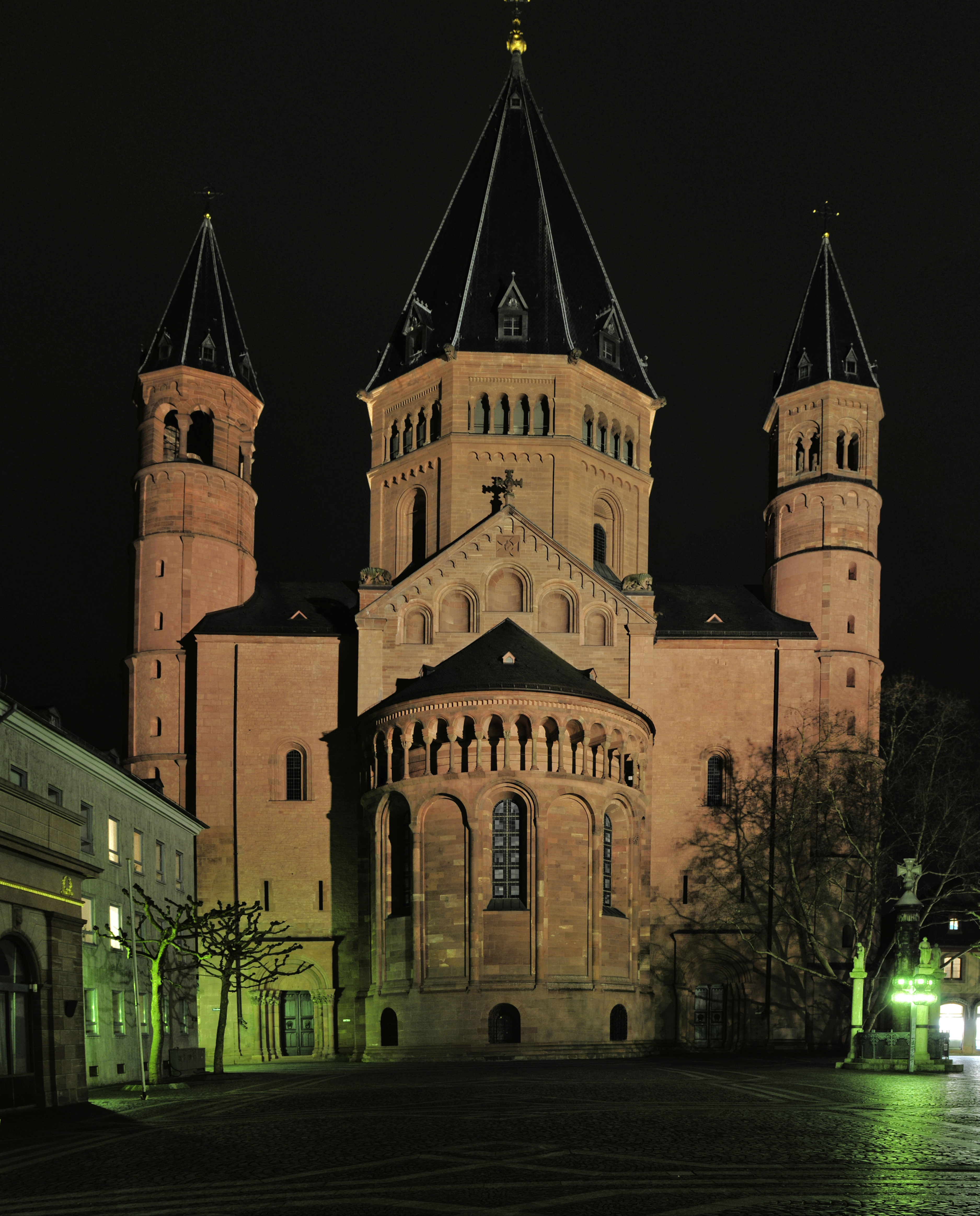 Nachtaufnahme Mainz